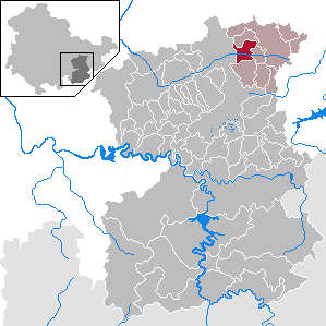 Dreitzsch in Thuringia - Saale-Orla-Kreis